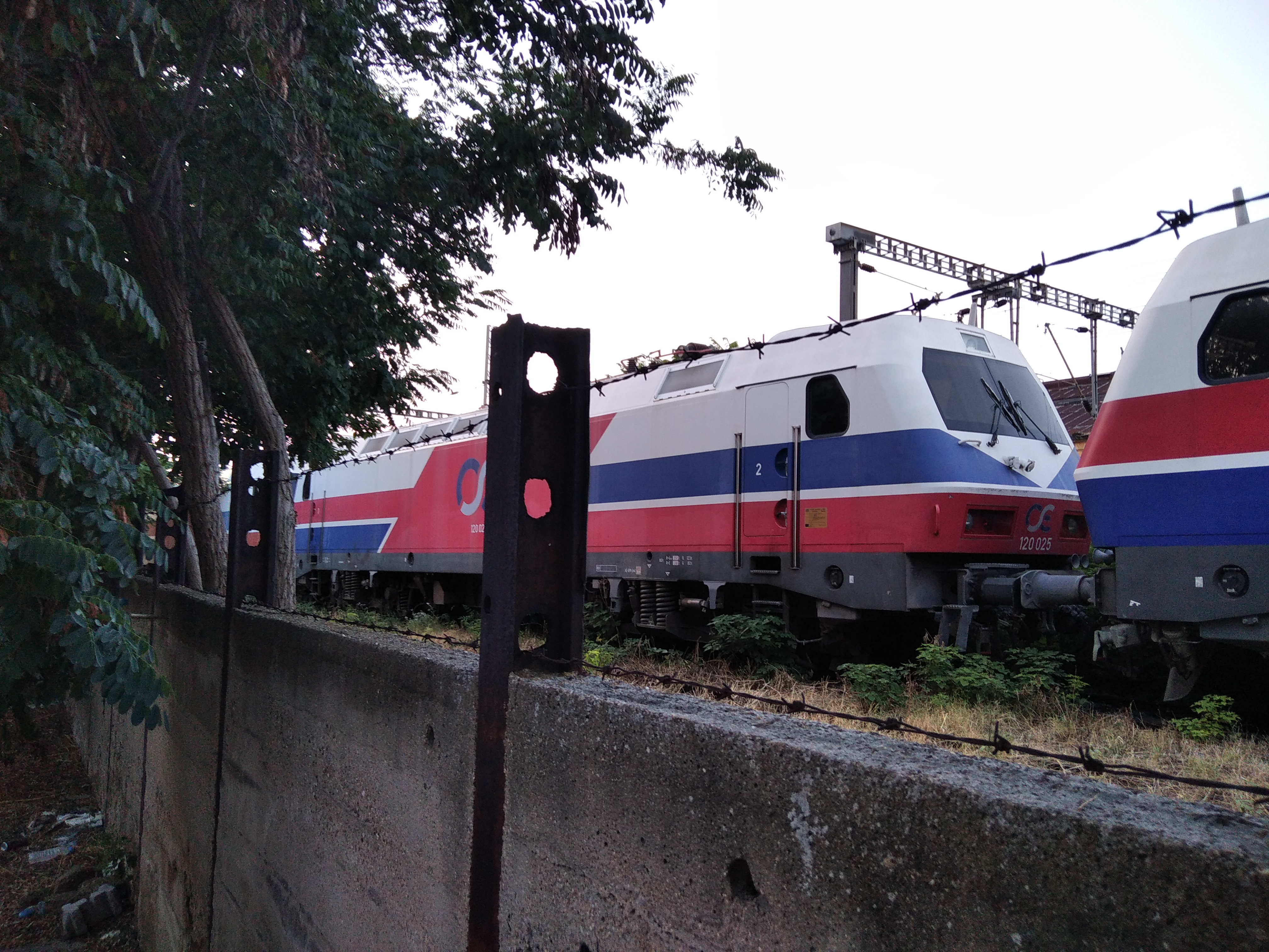 Η/Α